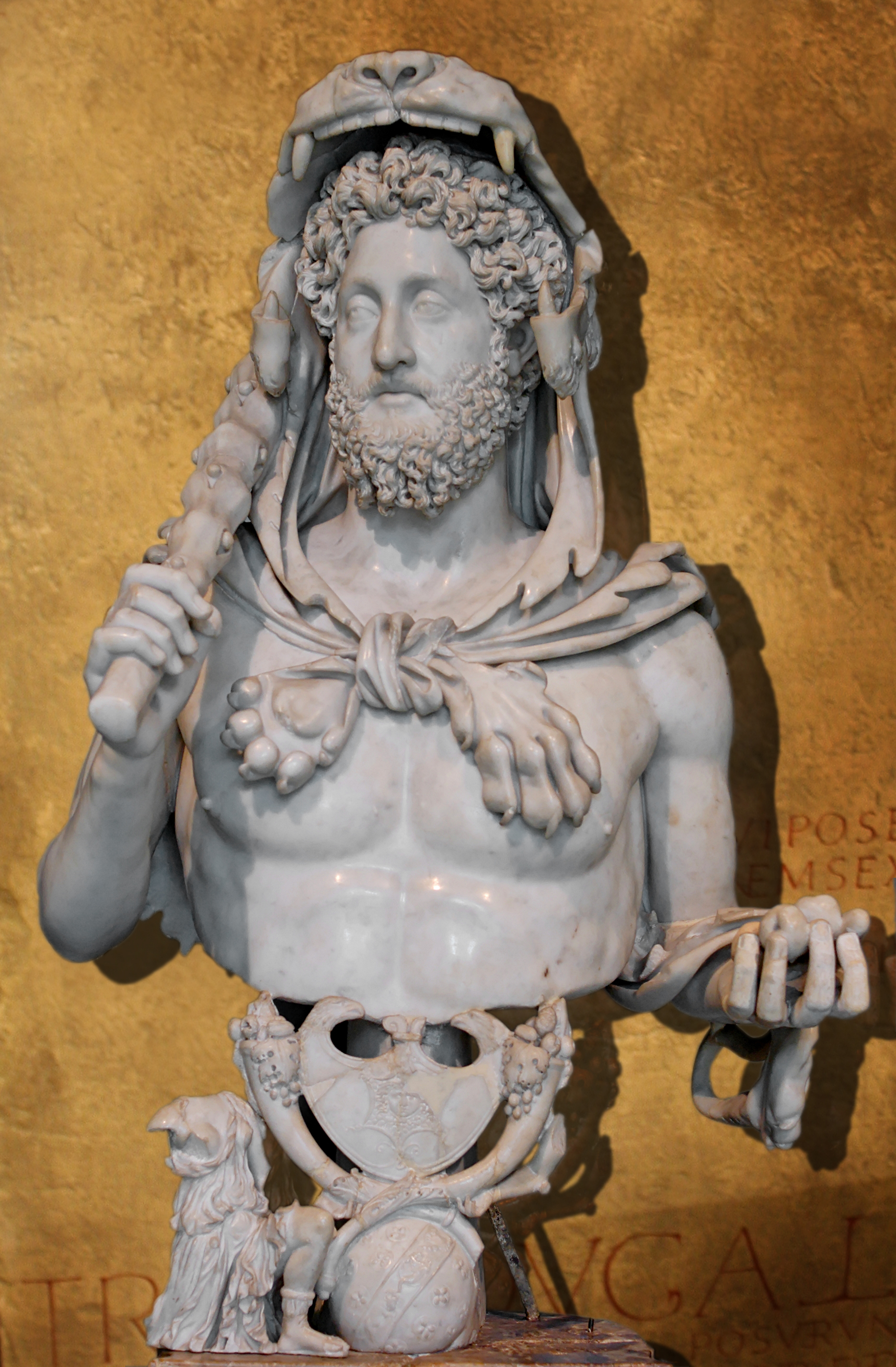 Buste de Commode en Hercule, portant la peau de lion, la massue et les pommes d'or des Hespérides. Élément d'un groupe représentant l'apothéose de Commode. Marbre de Luni, œuvre romaine, 191-192 ap. J.-C. Découvert dans une chambre souterraine du complexe des Horti Lamiani, 1874.